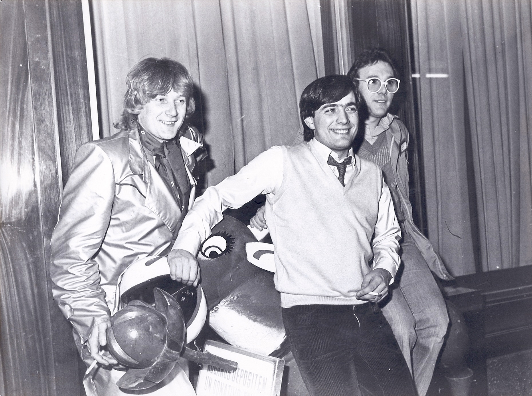 1980. Buggles i el seu Video killed the radio star amb Xarli Diego. Ràdio Barcelona i Caspe Street.